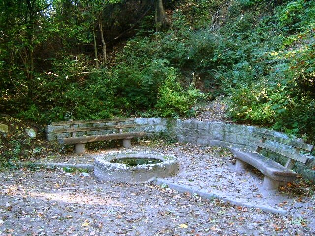 Gefasster Brunnen (ehemals Waldsprudel genannt). Standort: Pfingstberg in Niedereschbach